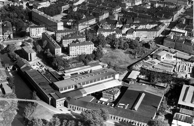 Myrens Verksted, Oslo, 1953